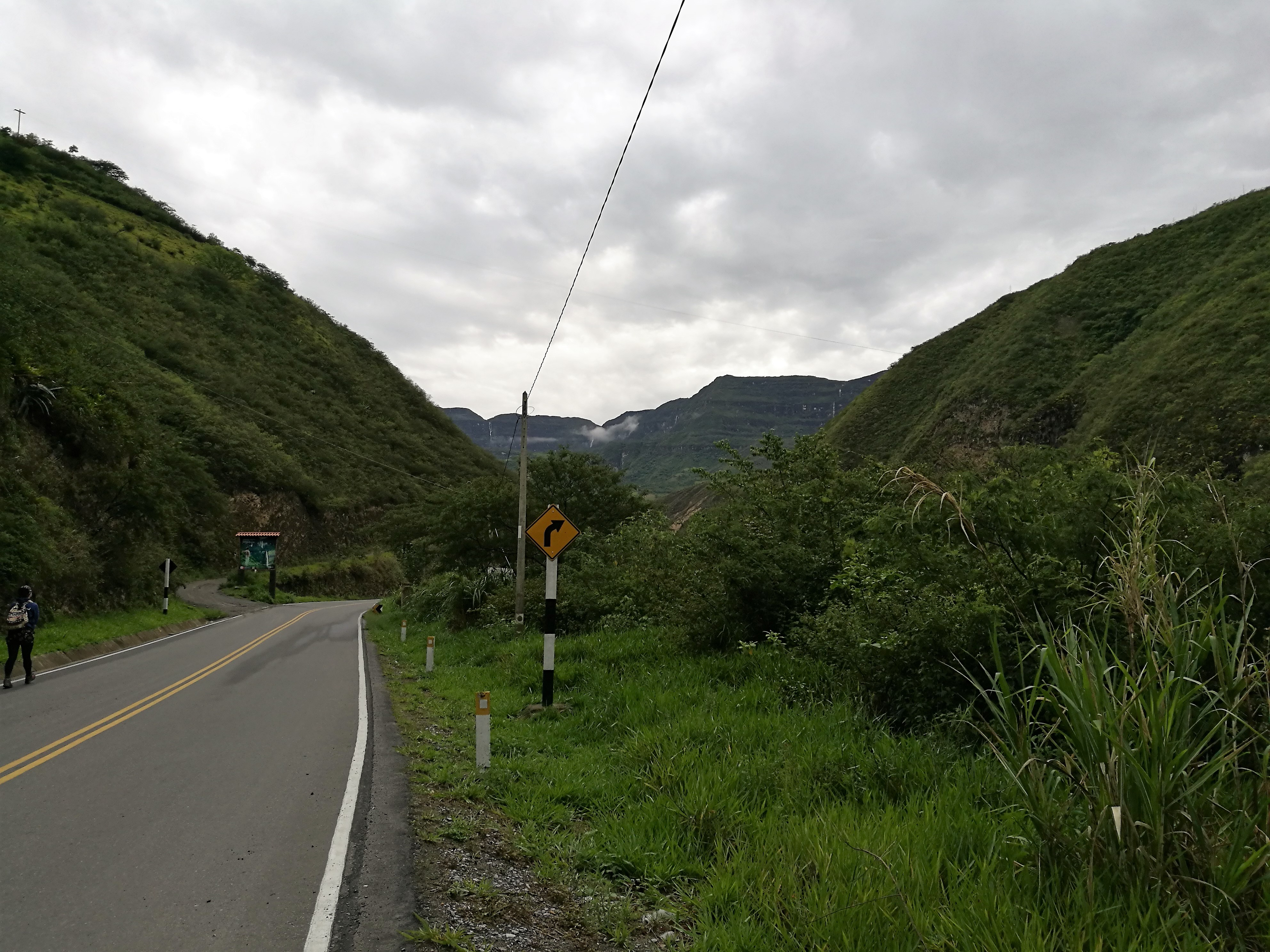 Vista des de la carretera de Pedro Ruiz a Chachapoyas al seu trencant a San Pedro de Valera